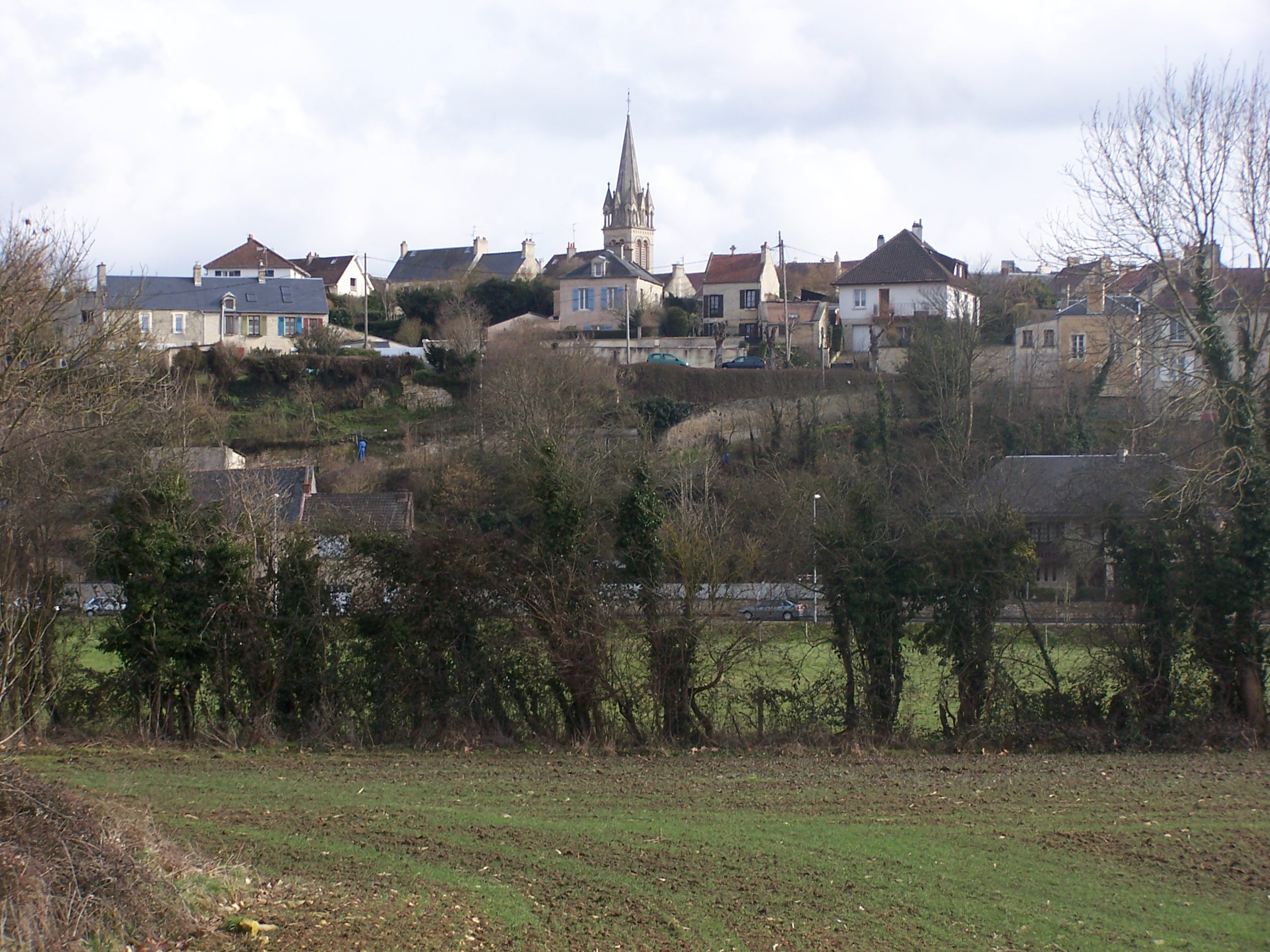 Fleury-sur-Orne, un village à flanc de coteau